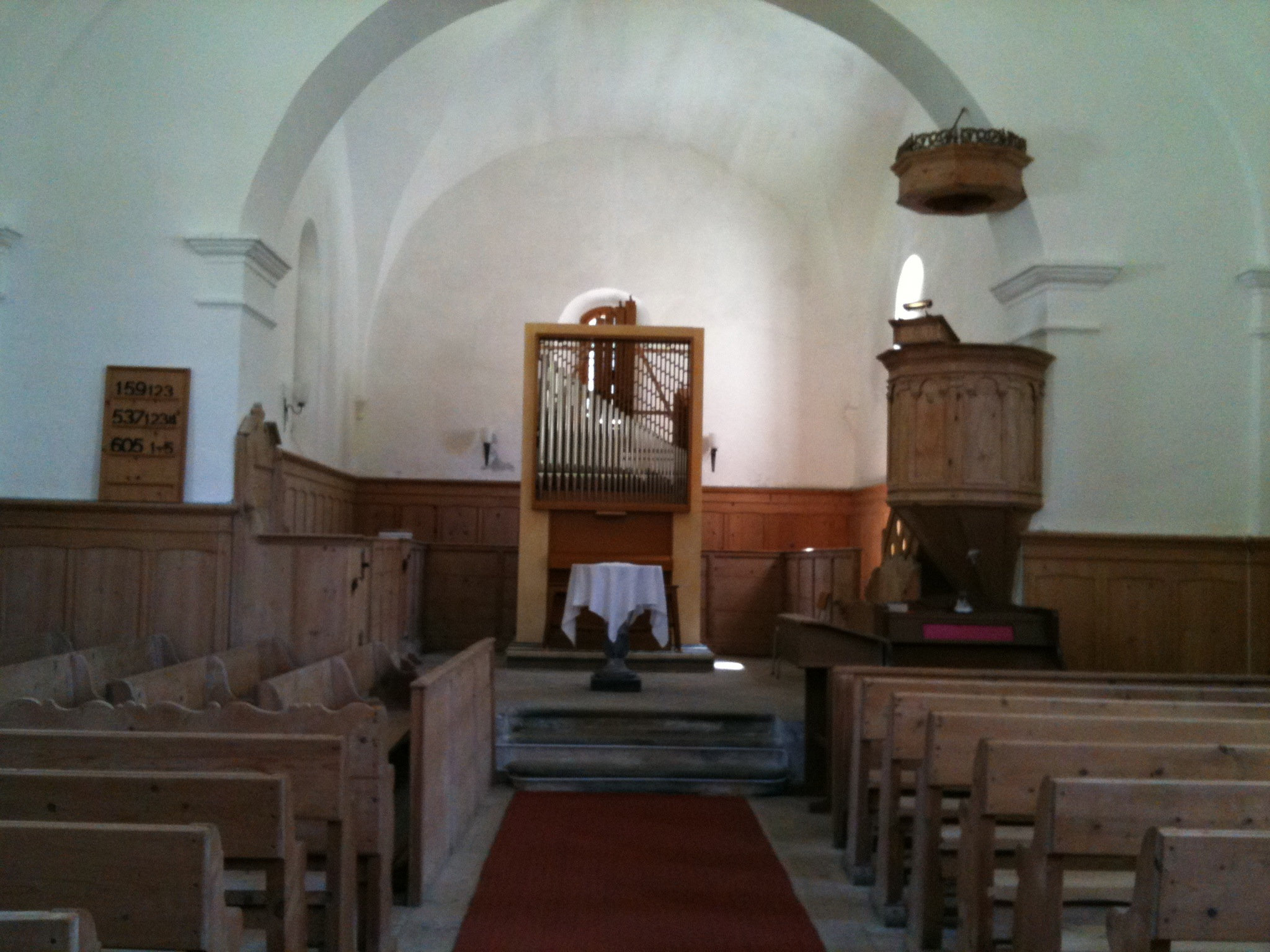 reformierte Kirche Hinterrhein, Kanton Graubünden